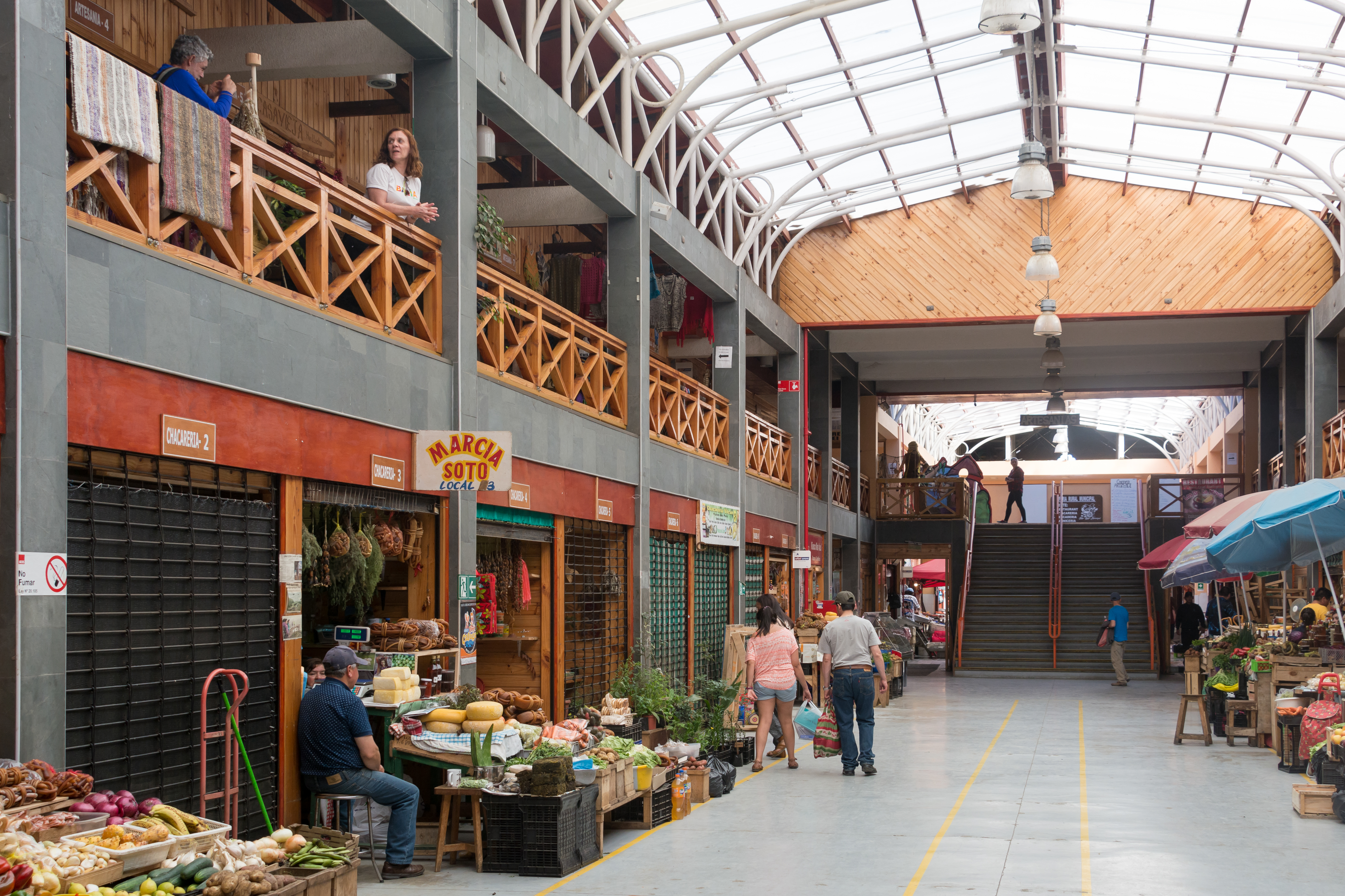 Feria Municipal, Ancud, Región de Los Lagos, Chile.